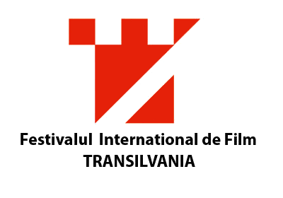 Logo Transilvania International Film Festival